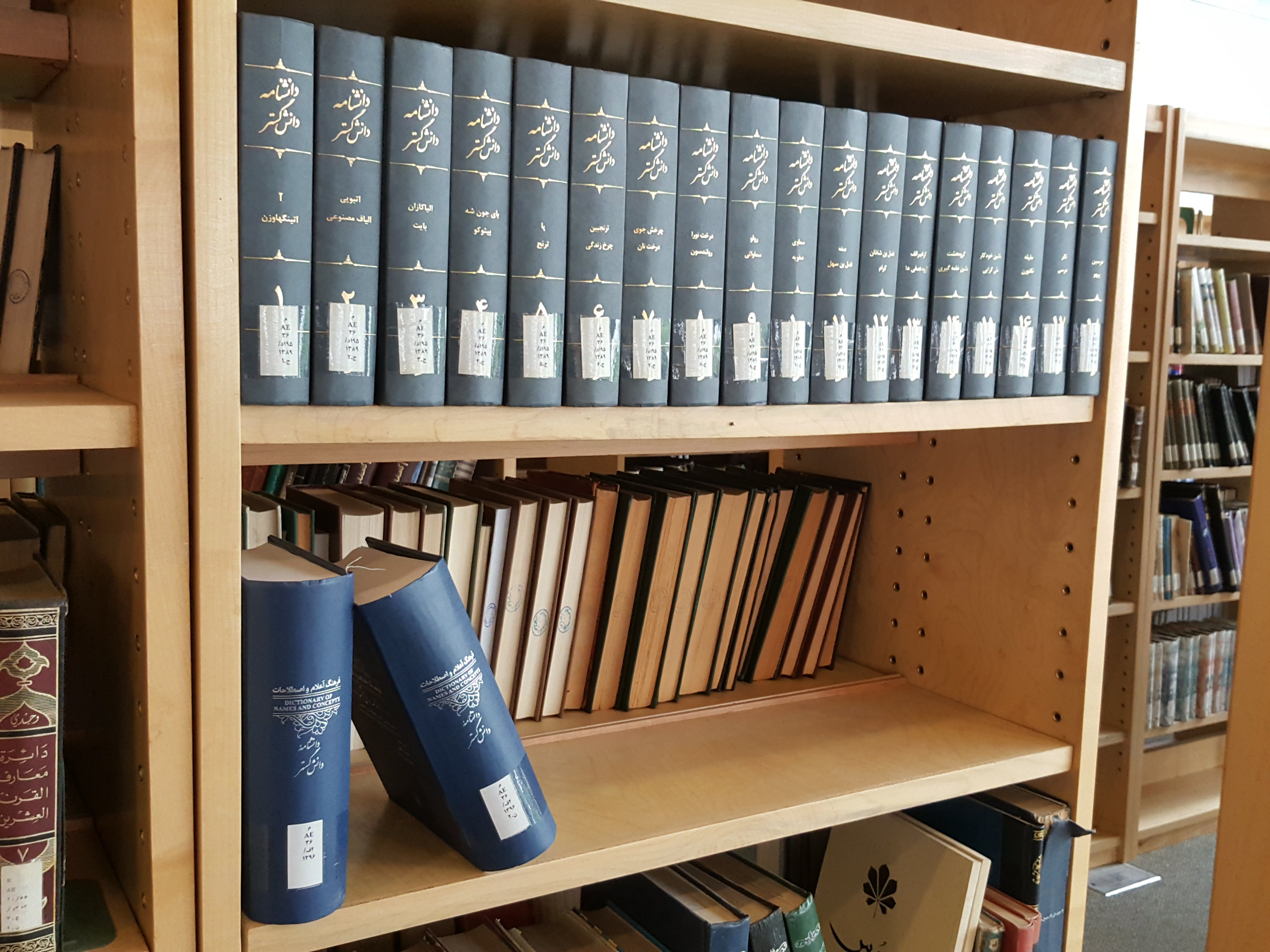 دانش‌نامه‌ی دانش‌گستر در تالار مرجع کتابخانه‌ی فرهنگستان زبان و ادب فارسی